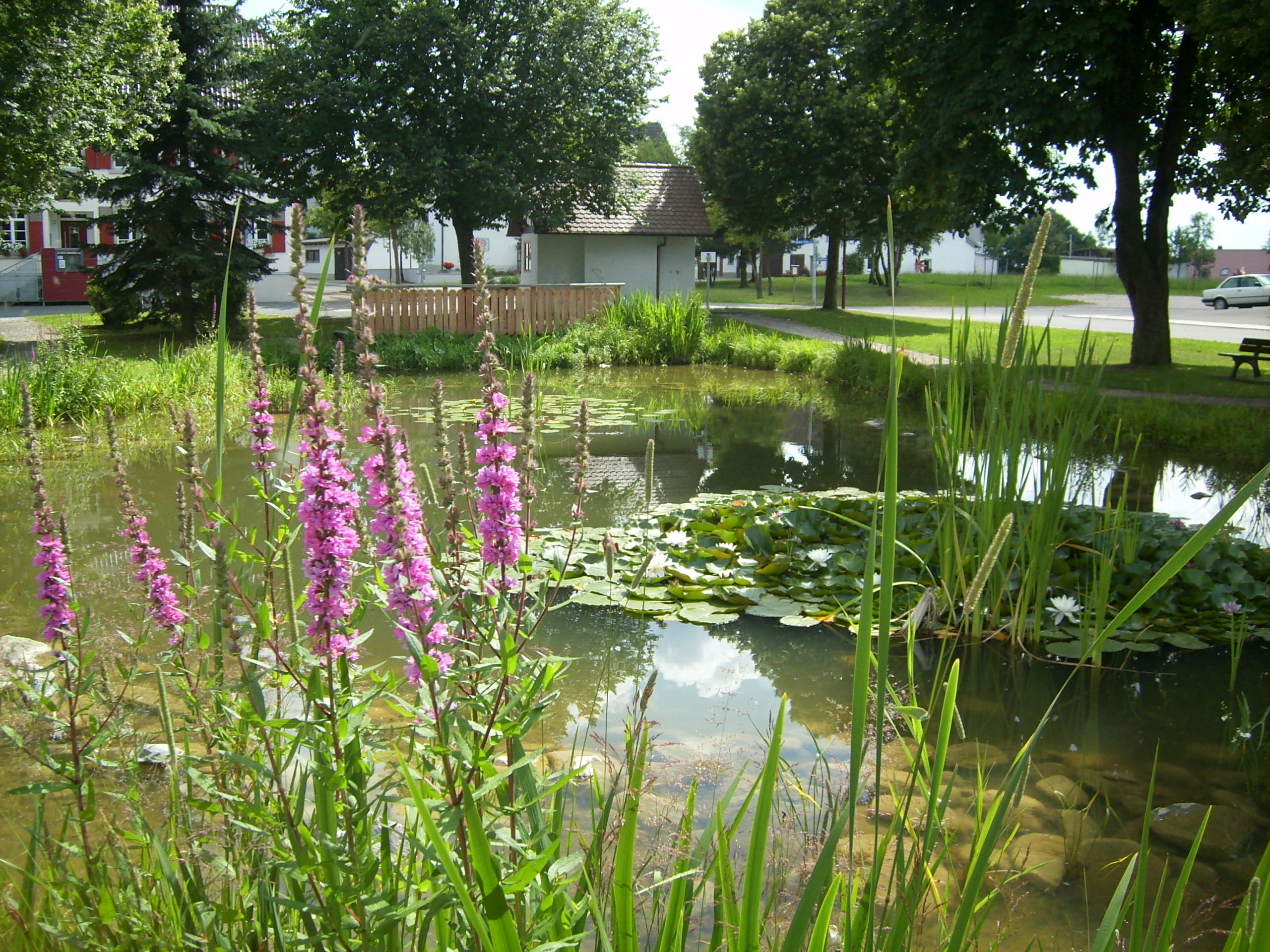 Die Hilb - der Dorfteich von Heinstetten, Deutschland. Die große Hilb vor dem Rathaus entstand um 1750. Sie wurde mehrmals umgebaut und um 1970 zugeschüttet und in einen Park umgewandelt. Für die 1200-Jahr-Feier im Jahr 1993 wurde die Hilb wieder in ihren Urzustand versetzt. the town pond of Heinstetten, Germany